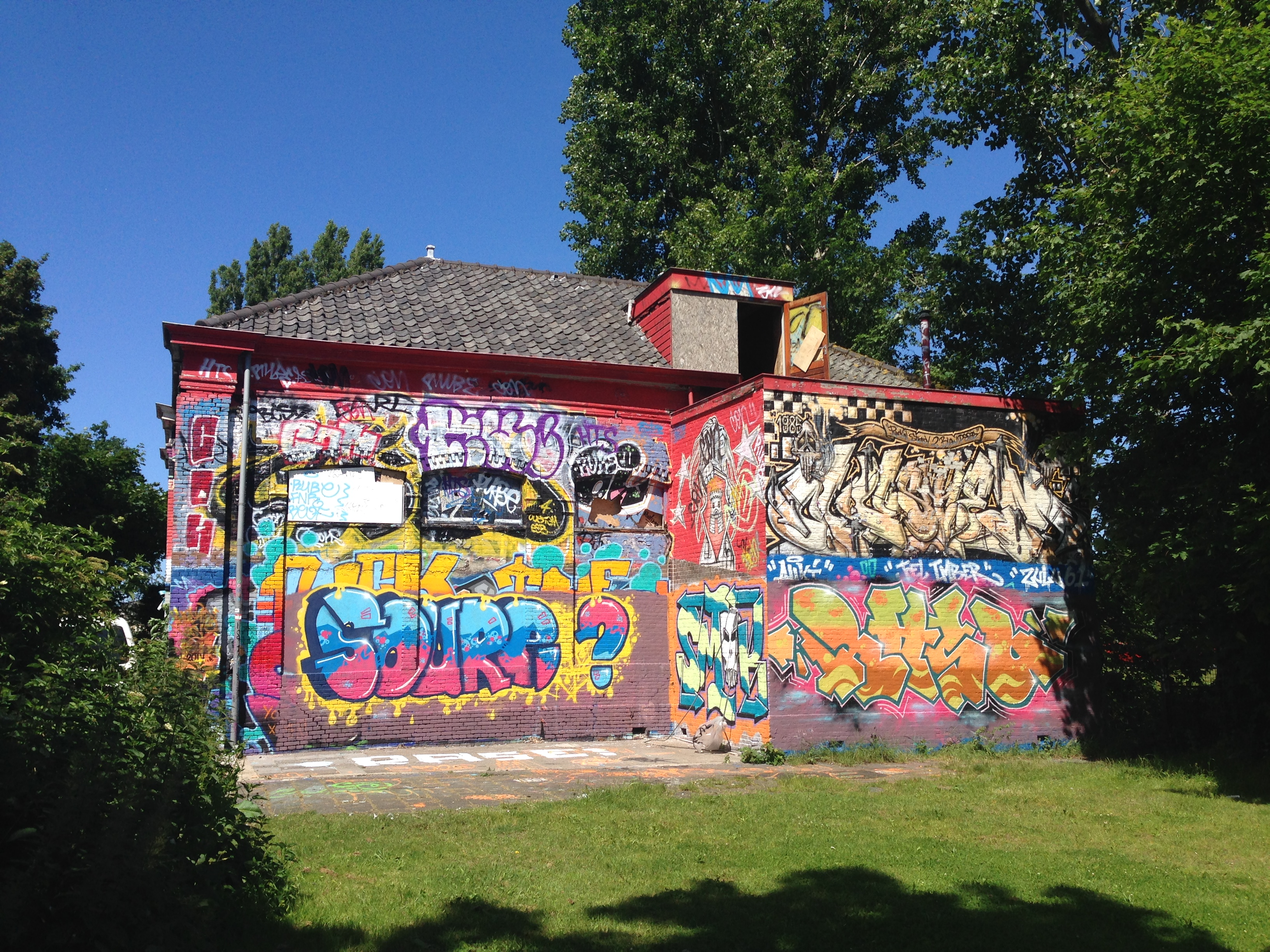 Het Victoriepark in Alkmaar, met daarin het IJkgebouw, dat op de nominatie staat om vervangen te worden door nieuwbouw dat sterk lijkt op het oorspronkelijke ontwerp.